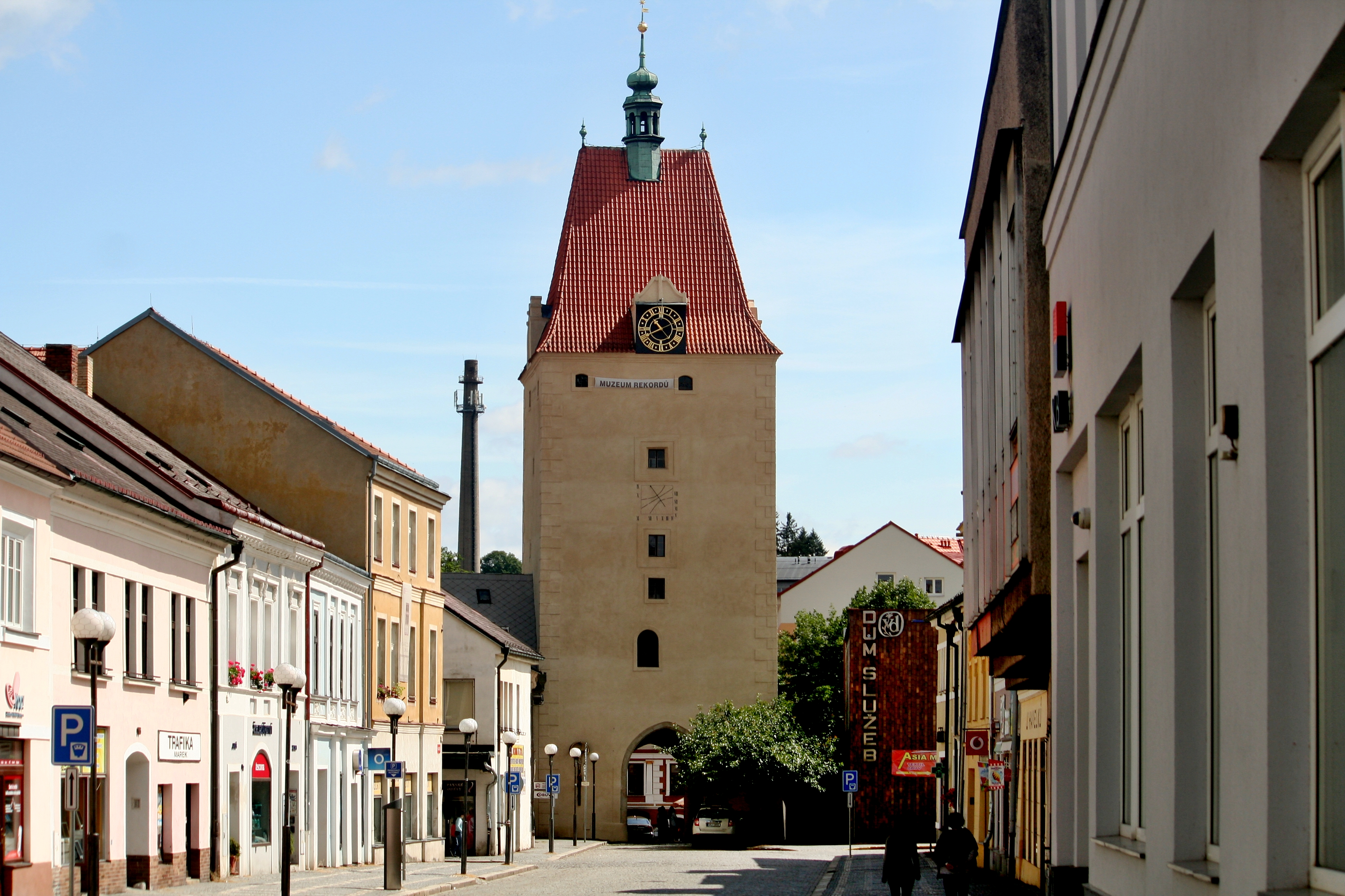 Pelhřimov